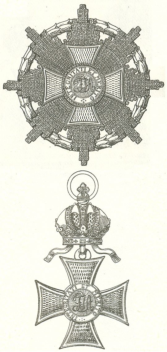 Scan van het boek van de in 1902 gestorven Maximilian Gritzner Uitgave 1884 Scan van Blz. 273 en 274 van het boek "Handbuch der Ritter- und Verdienstorden " uitgegeven 1893 door Weber.Tekening van de in 1902 overleden Maximilian Gritzner. Robert Prummel 10 jul 2008 16:40 (CEST)